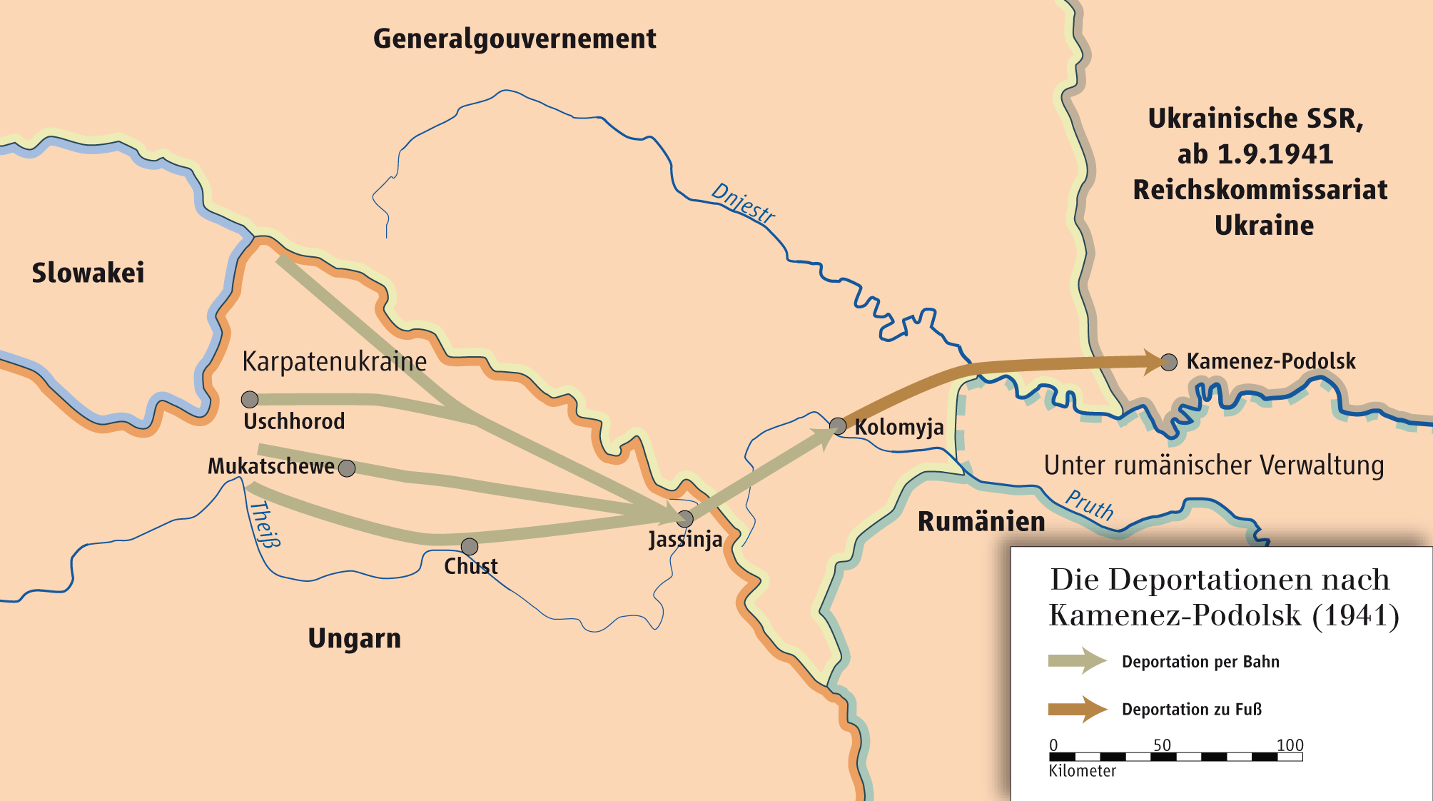 Deportationen nach Kamenec Podolski, Juli und August 1941